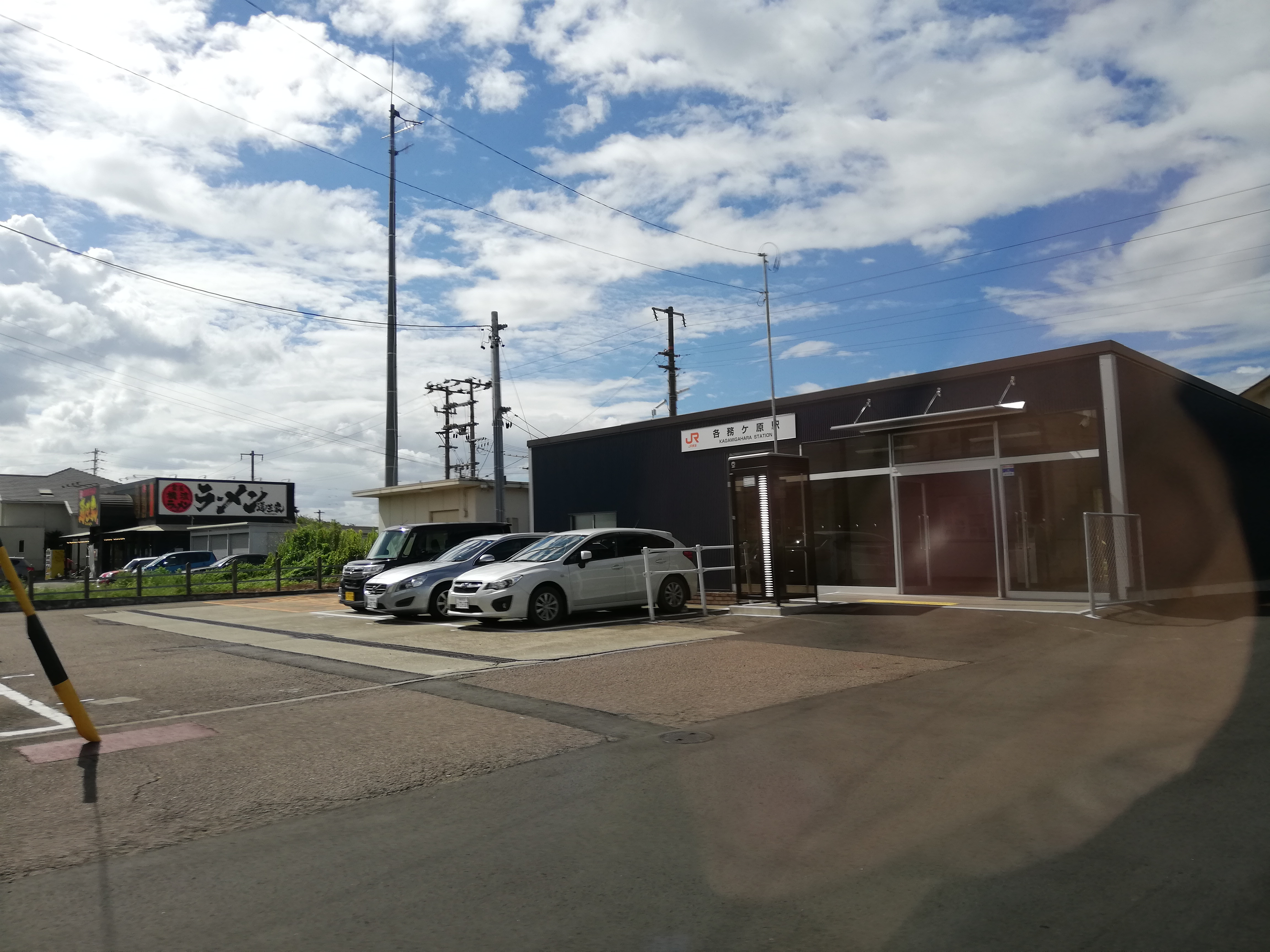 高山本線の各務ケ原駅。